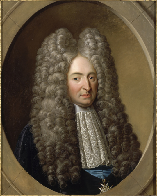 Michel Chamillart (1654-1721). Contrôleur général des finances (1699).